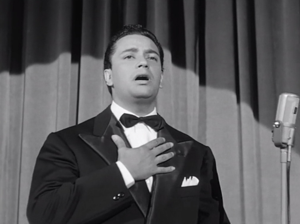 Screenshot dal film Accadde al commissariato (1954)